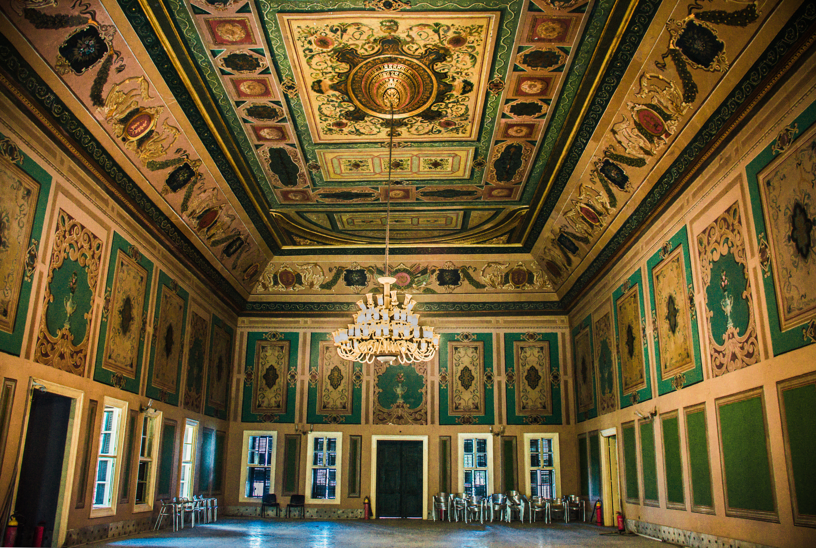 القاعة الرئيسية بالقصر